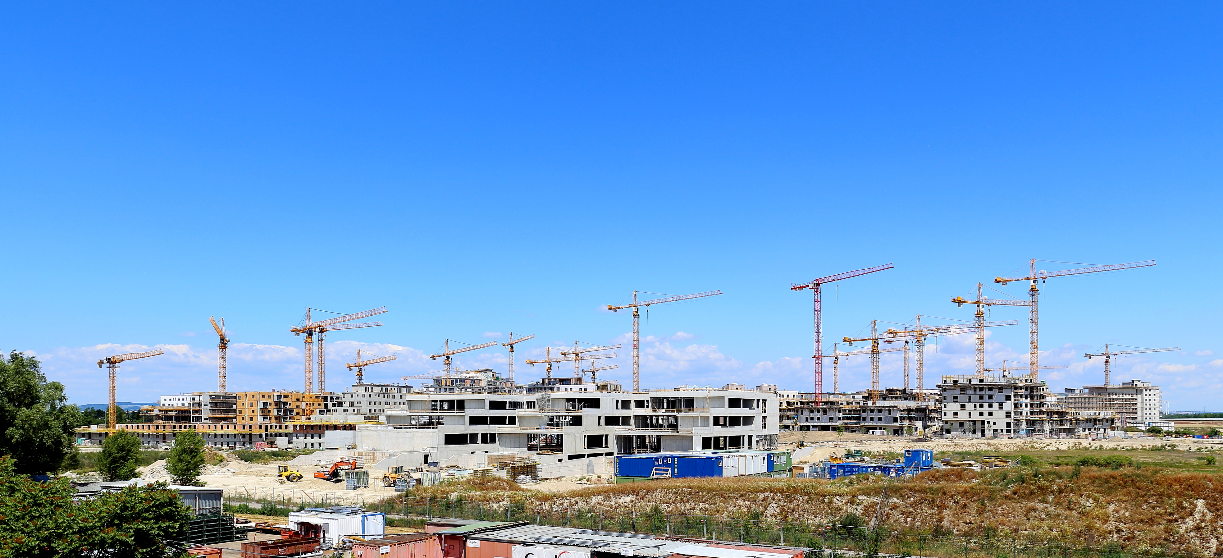 Bauphase der ersten Tranche an Wohnungen im südwestlichen Teil des Seestadt-Areals. Bis Ende 2014 bzw. Anfang 2015 sollen die ersten Wohnungen bezugsfertig sein. Geplant sind bis 2028 rund 10.500 Wohneinheiten für mehr als 20.000 Menschen sowie Betriebsstätten für rund 20.000 Arbeitsplätze.